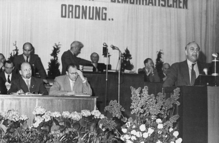 16. Vollsitzing der Volkskammer. Am 17 5 1950 fand in Berlin die 16. Vollsitzung der Provisorischen Volkskammer der Deutschen Demokratischen Republik statt. Auf der Tagesordnung stand u.a. eine Regierungserklärung zur Herabsetzung der Reparationszahlungen Deutschlands an die Sowjet-Union UBz: Adolf Deter (FDGB) bei seiner Ansprache. (Links) Stellvertretender Ministerpräsident Ulbricht, daneben: Ministerpräsident Grotewohl. Aufn.: Illus Quaschinsky 6562-50